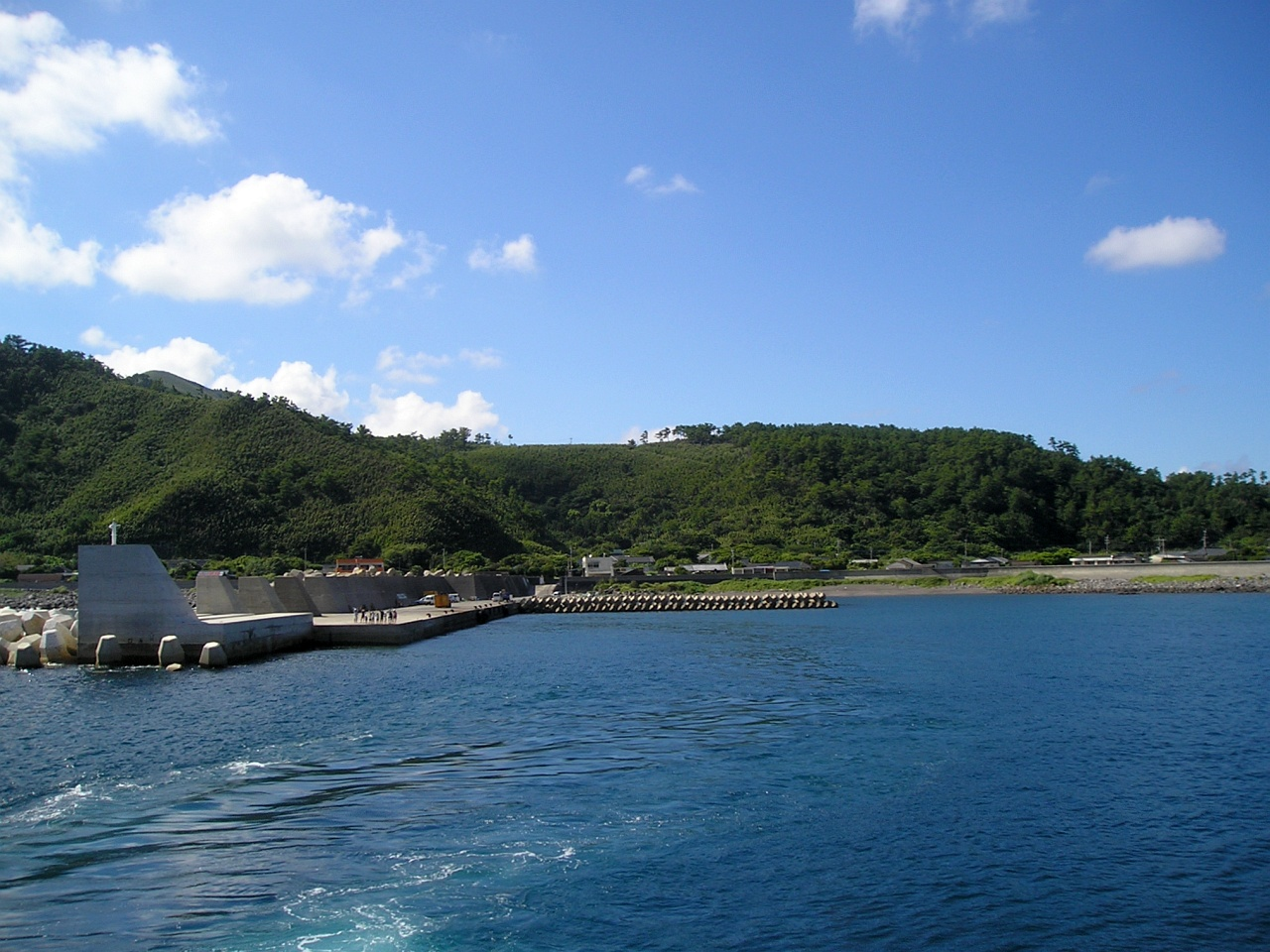 HON-MURA village on Kuchi-Erabu Island.